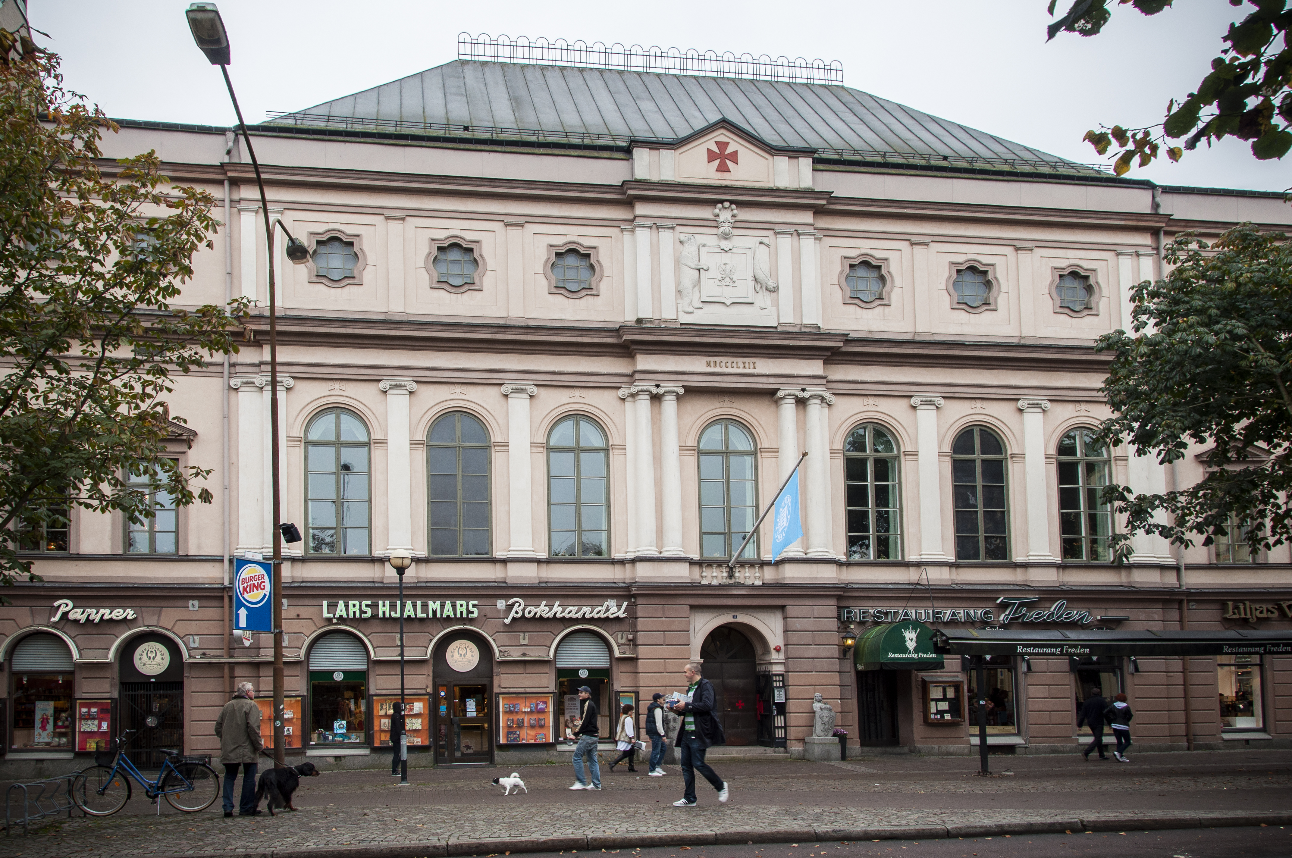 Frimurarlogen, Karlstad. Uppförd 1869. Arkitekt Johan Fredrik Åbom